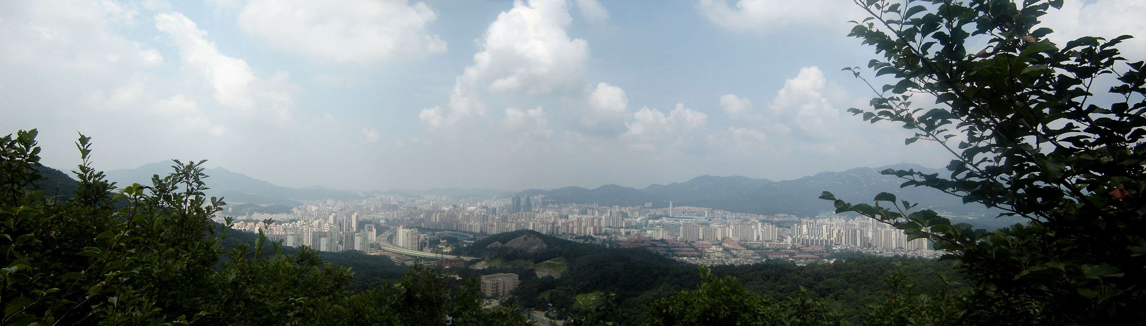 Anyang, South Korea